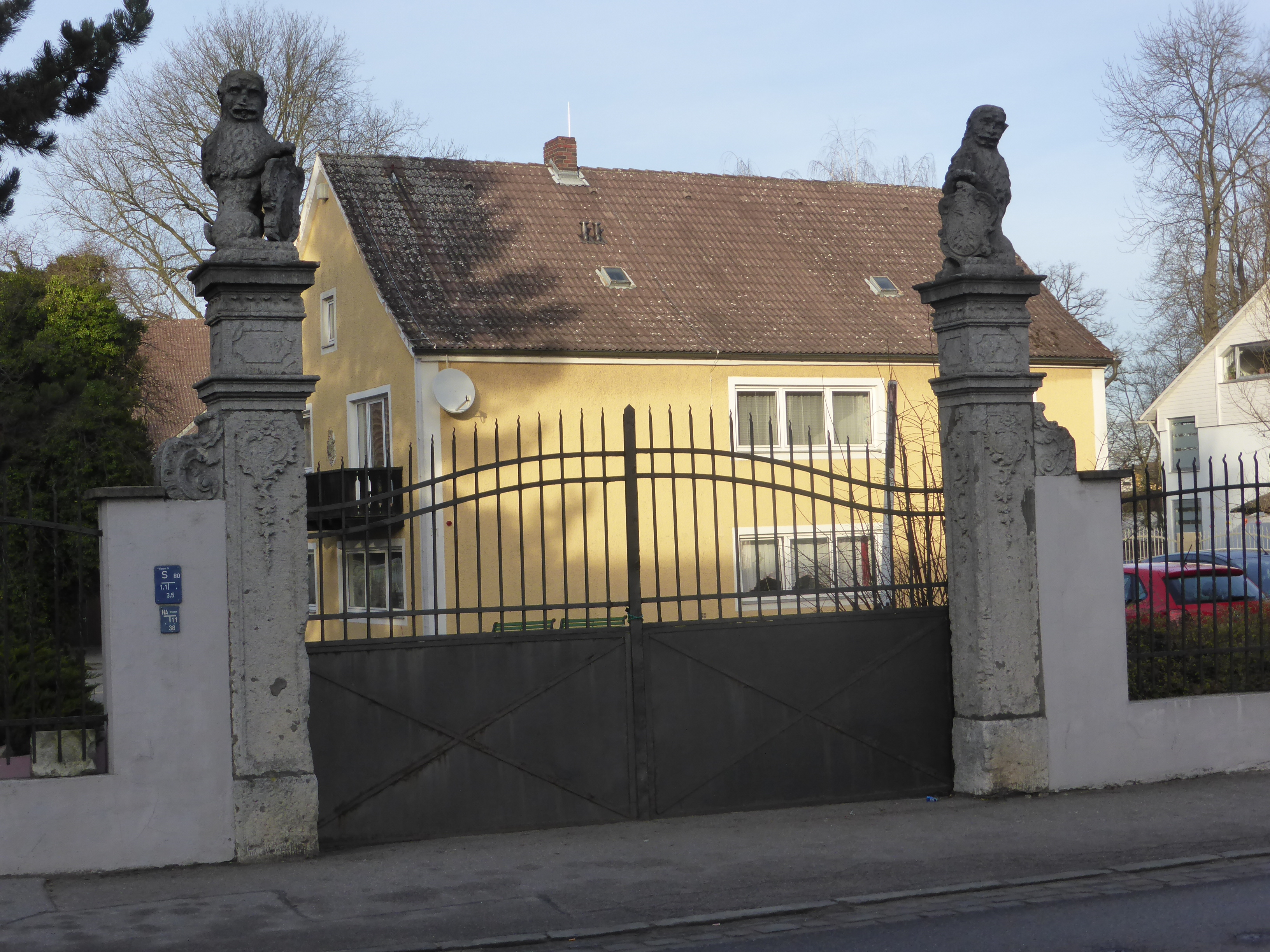 Neues Schloss Teublitz (Teublitz)